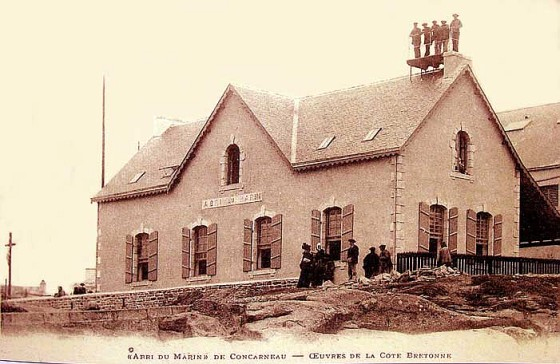 Abri du marin de Concarneau (aujourd'hui auberge de jeunesse). Photographie de Jacques de Thézac, archives de l'Œuvre du marin breton.